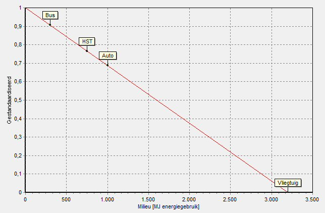 MCA Standaardisatiefunctie